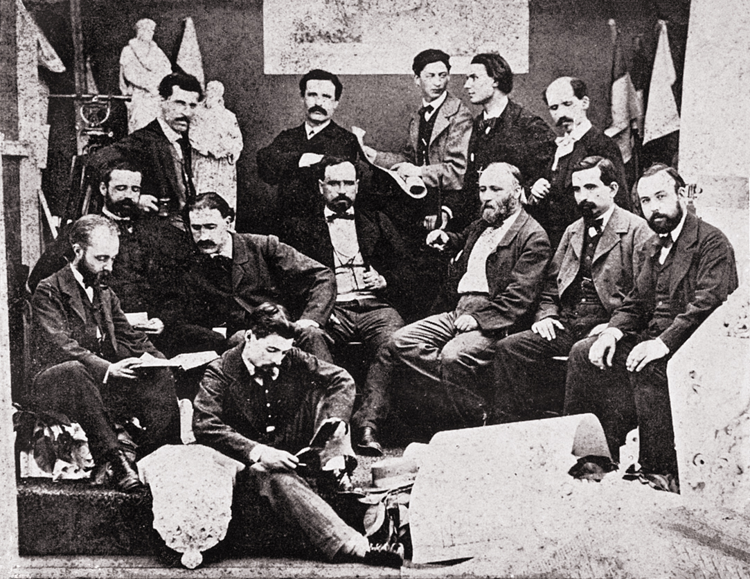 Architects who built the "Universidad Literaria de Barcelona" building.